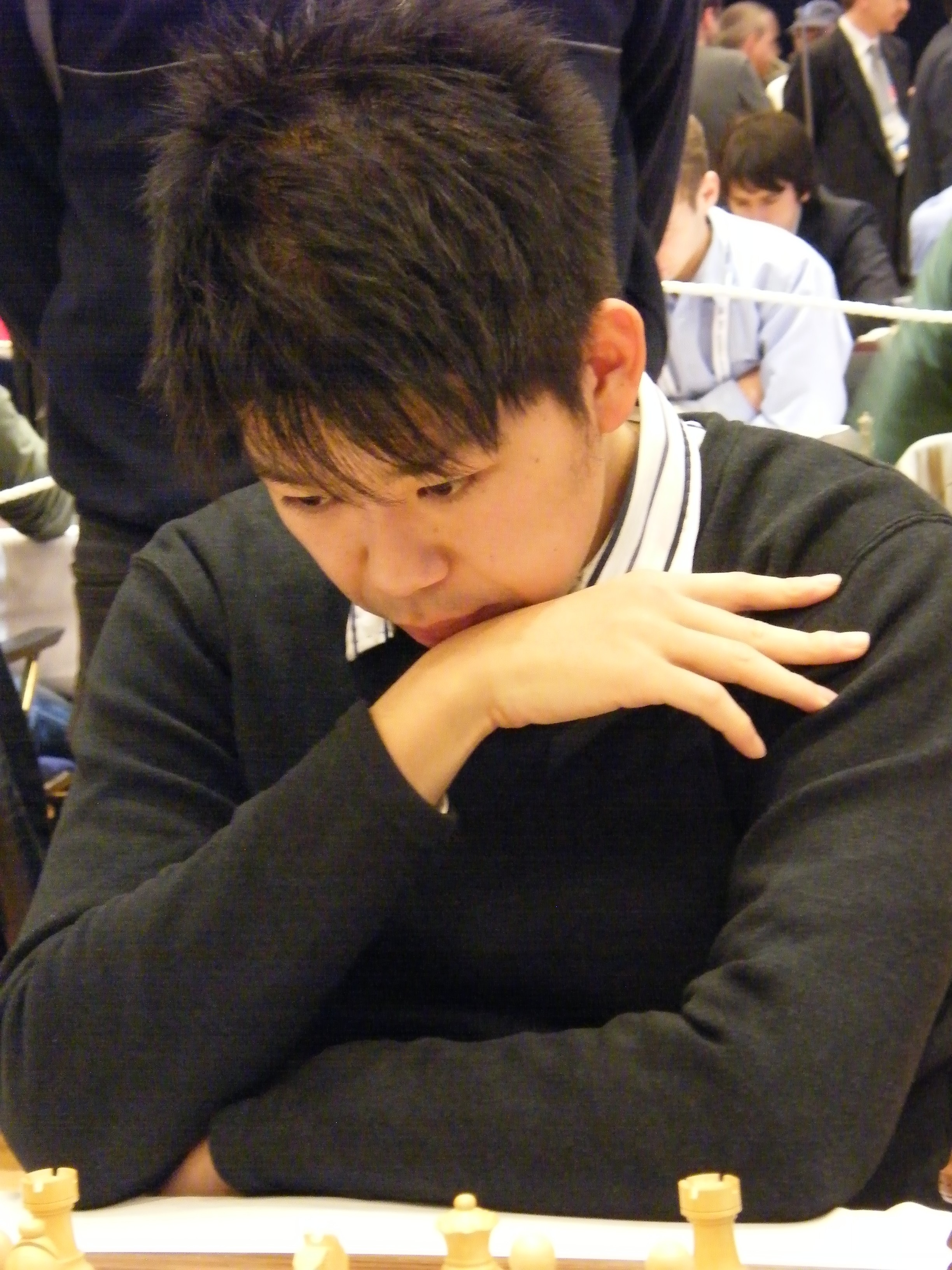 George Wendi Xie bei der 38. Schacholympiade in Dresden 2008